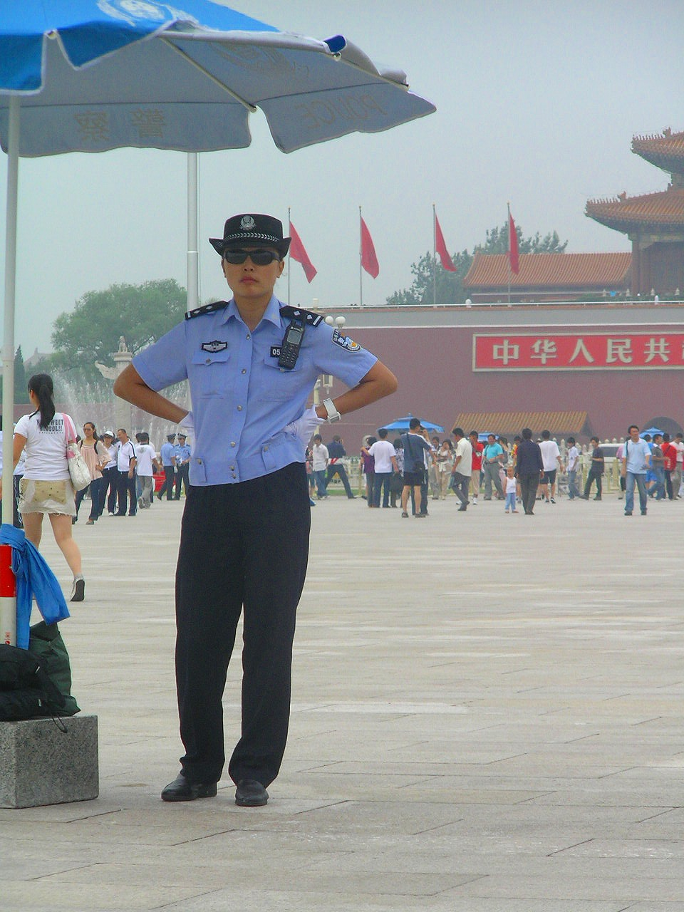 中華人民共和国人民警察の女性警察官。